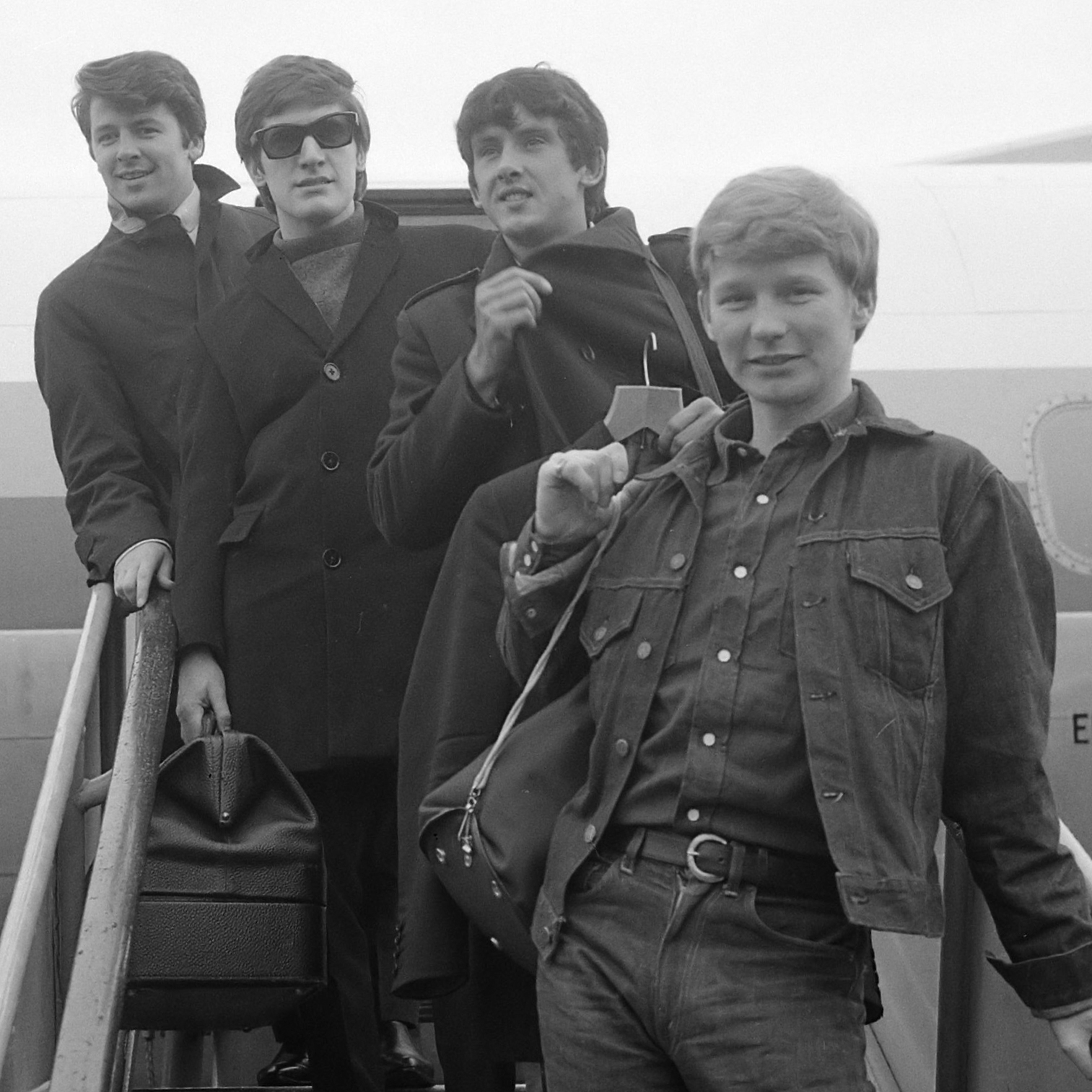 Beatgroep Searchers bij aankomst op Schiphol 17 september 1965